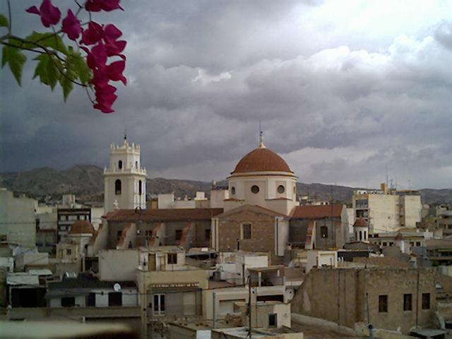 Església de la Mare de Déu de Betlem de Crevillent (el Baix Vinalopó, País Valencià).